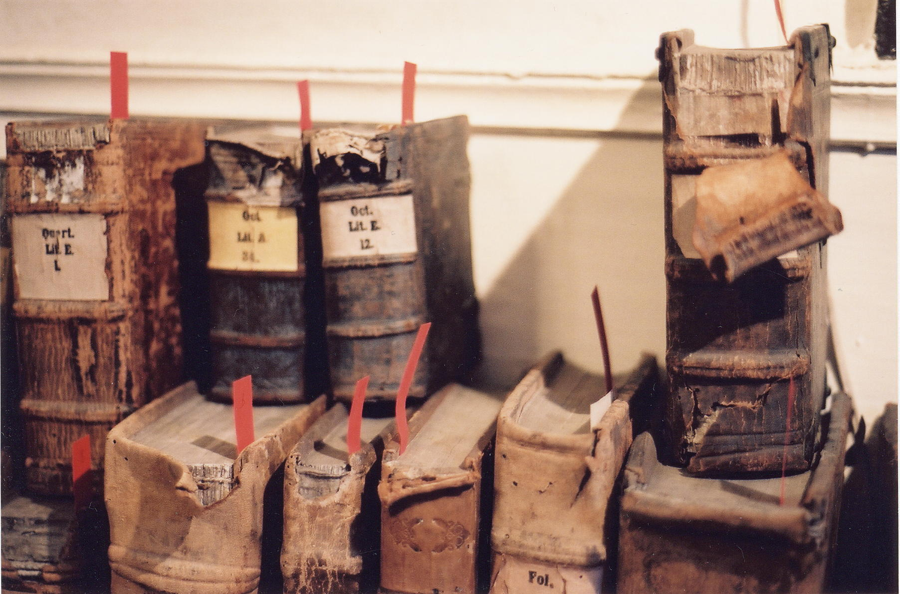 Einige Einbände von Büchern aus der Büchersammlung des Johannes Block